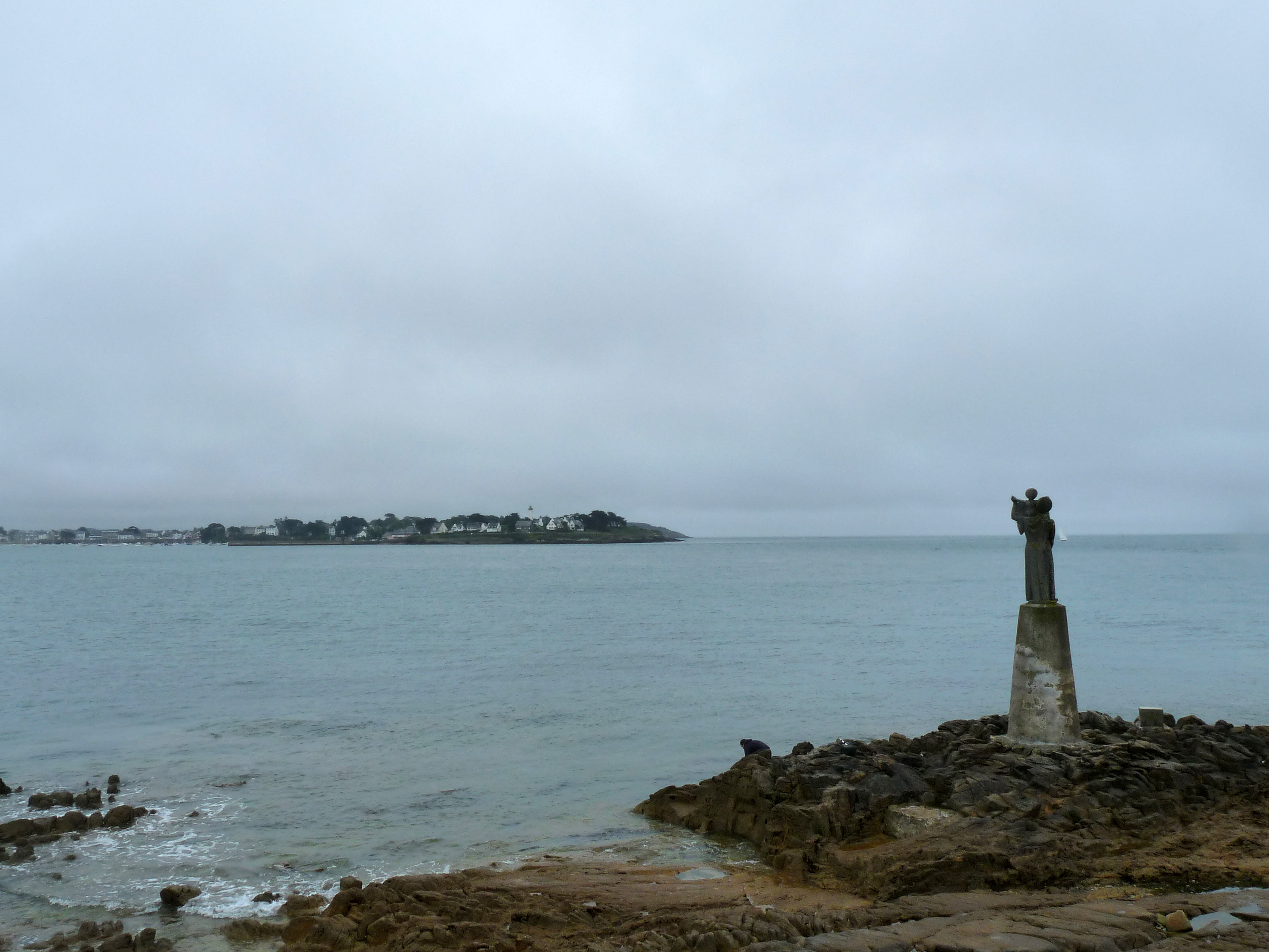 Notre Dame de Kerdro, par Jules-Charles Le Bozec (1898-1973). Pointe de Kerpenhir (Morbihan)